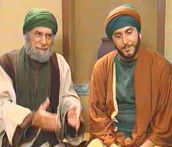 wamadat05